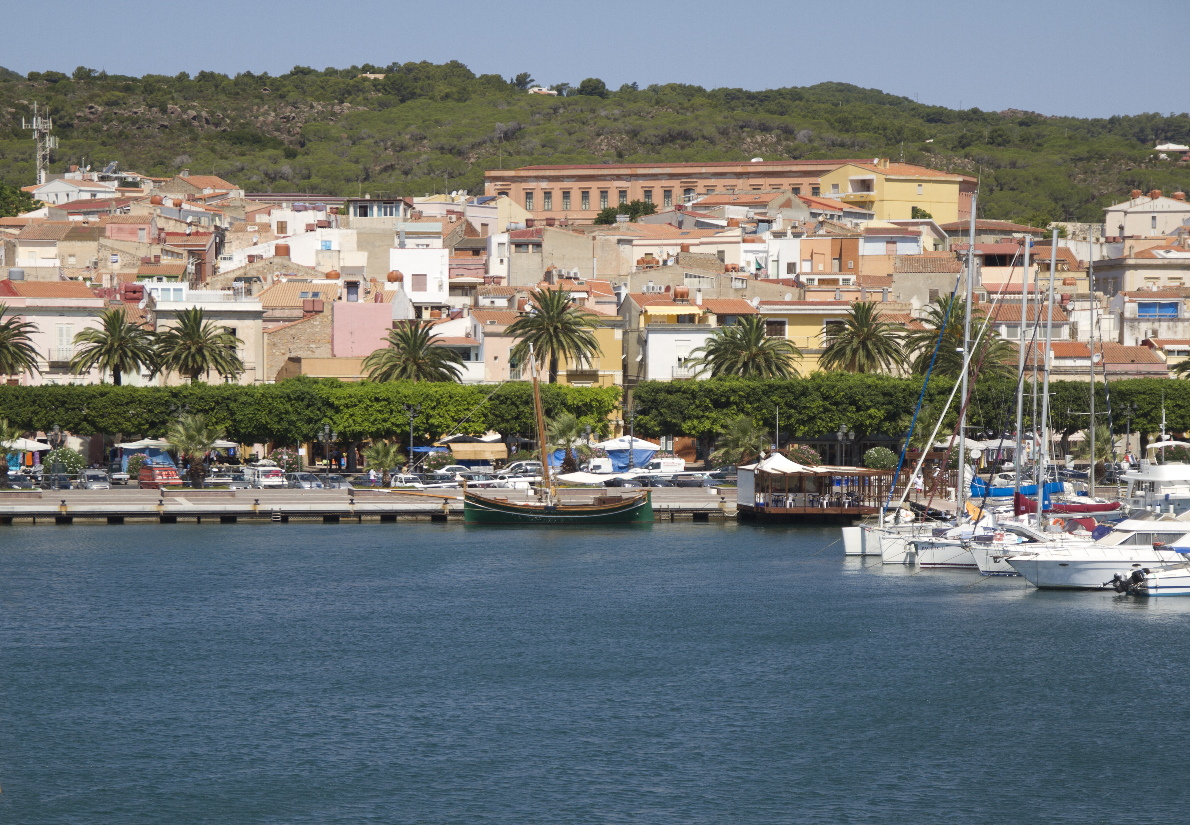 Carloforte, Isola di San Pietro CI, Sardinia Italy